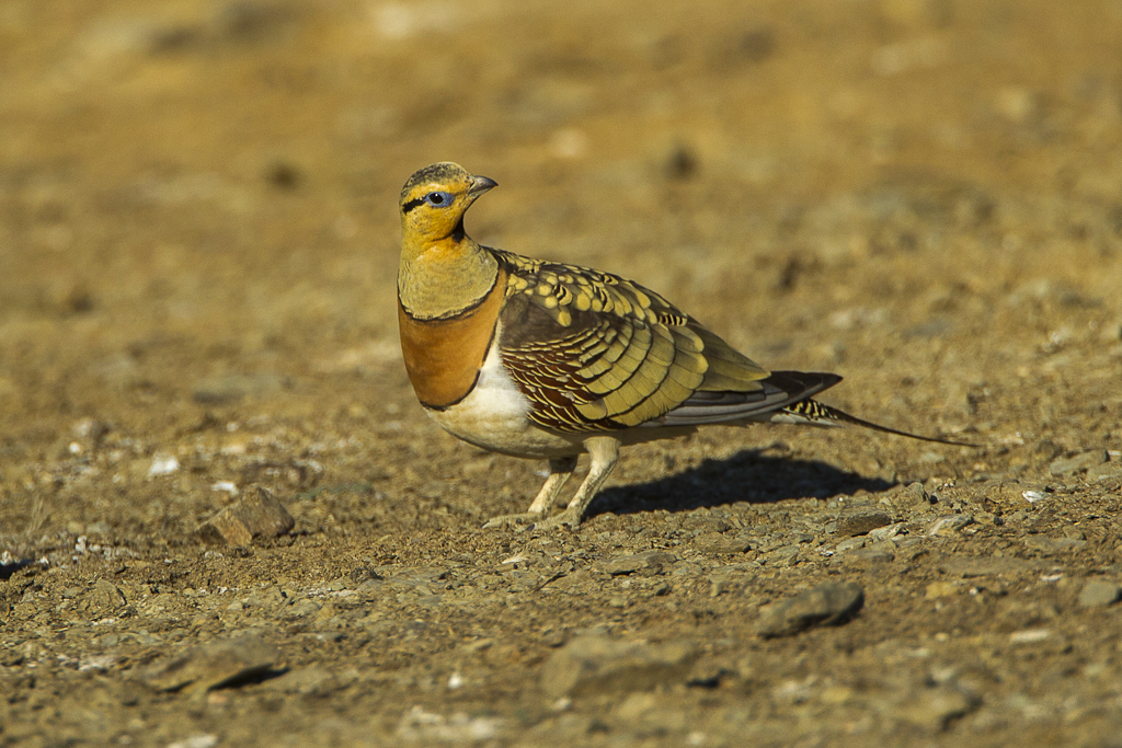 Pin-tailed Sandgrouse - Castuera - Estremadura_S4E6273